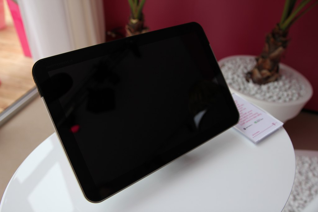 Motorola XOOM